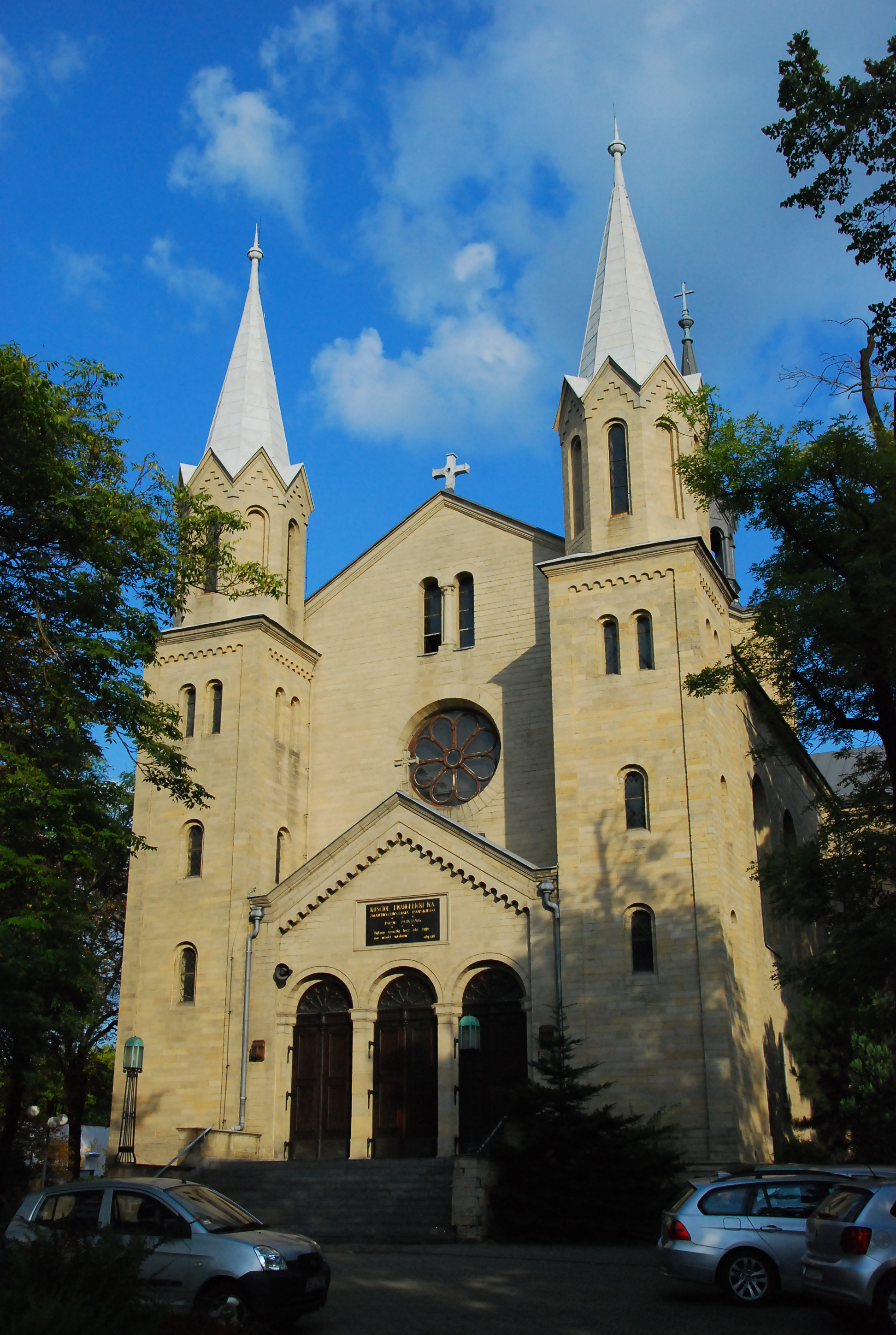 Katowice, kościół ewangelicko-augsburski, kon. XIX